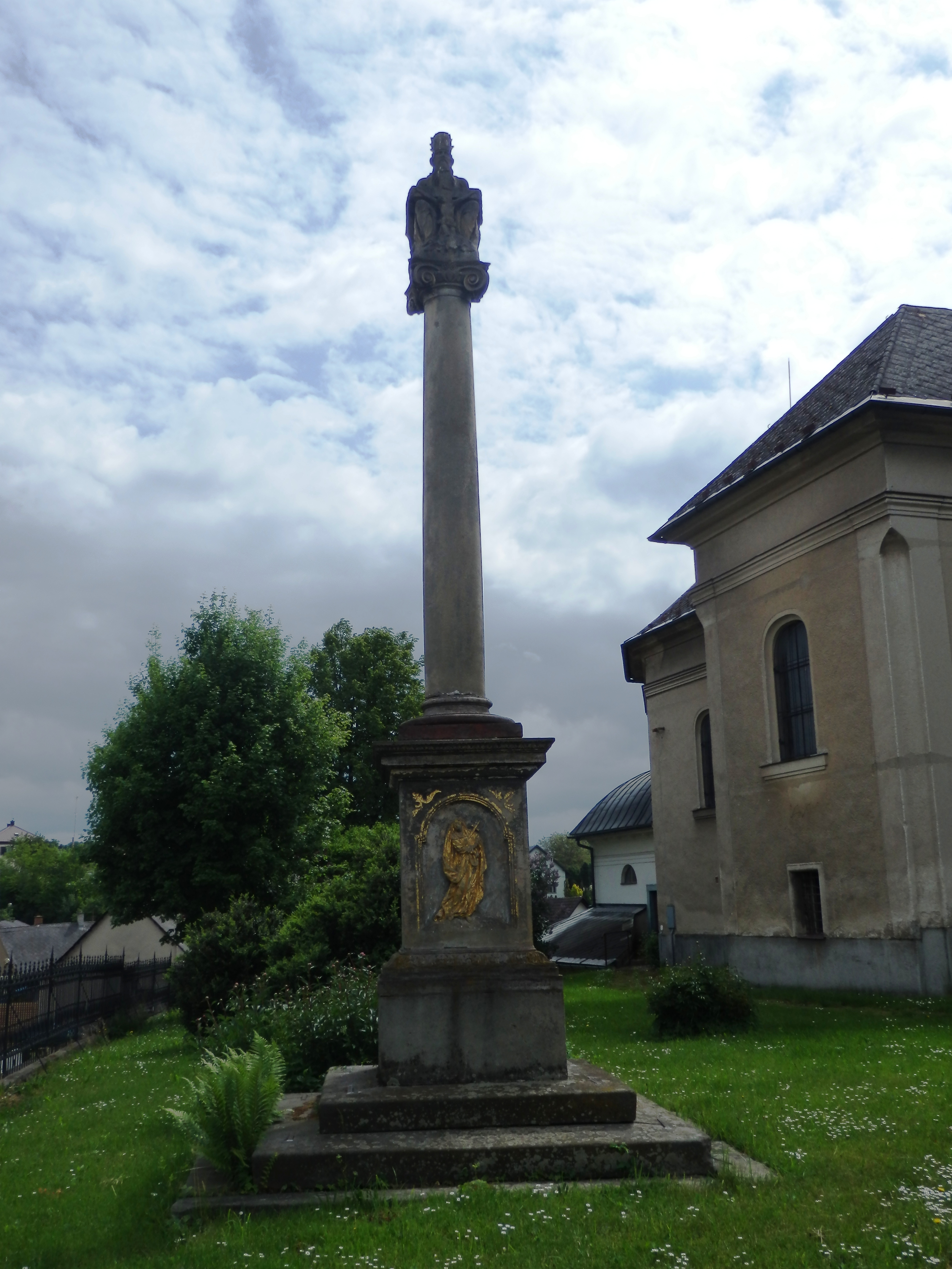 Sloup se sousoším Nejsvětější Trojice, u farního kostela svatého Jiří (K Zámečku, tř. A. Kašpara), Bludov (okres Šumperk).